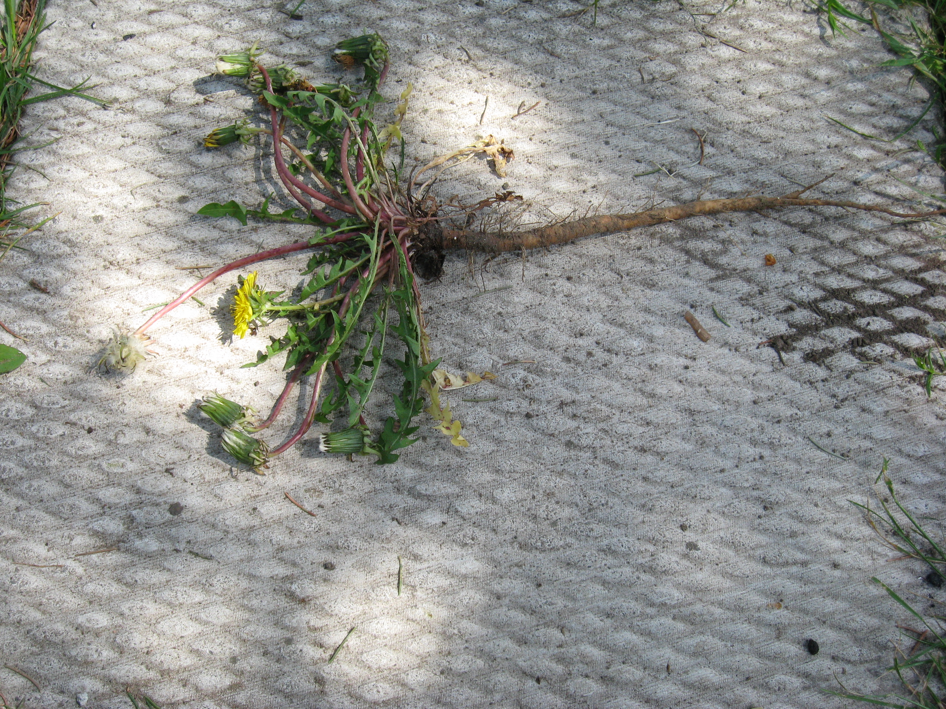 هندباء